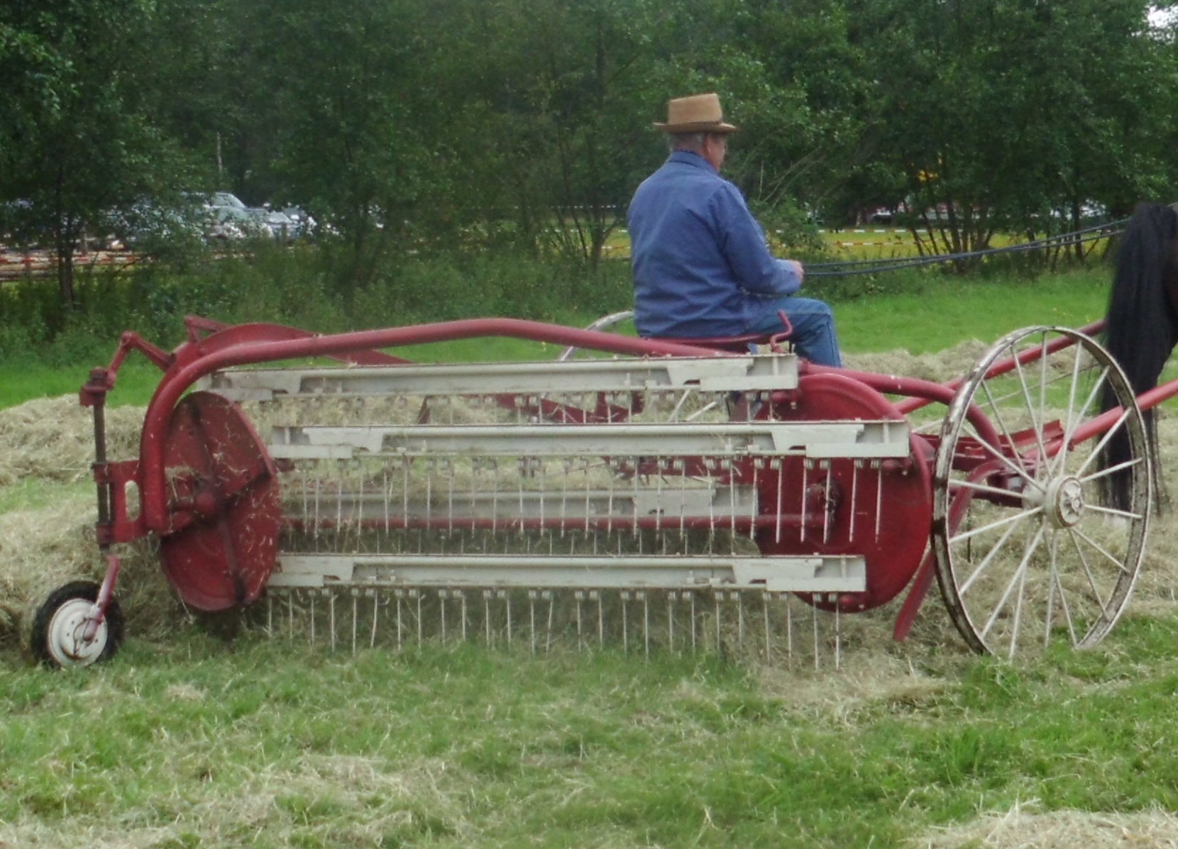 Harkkeerder